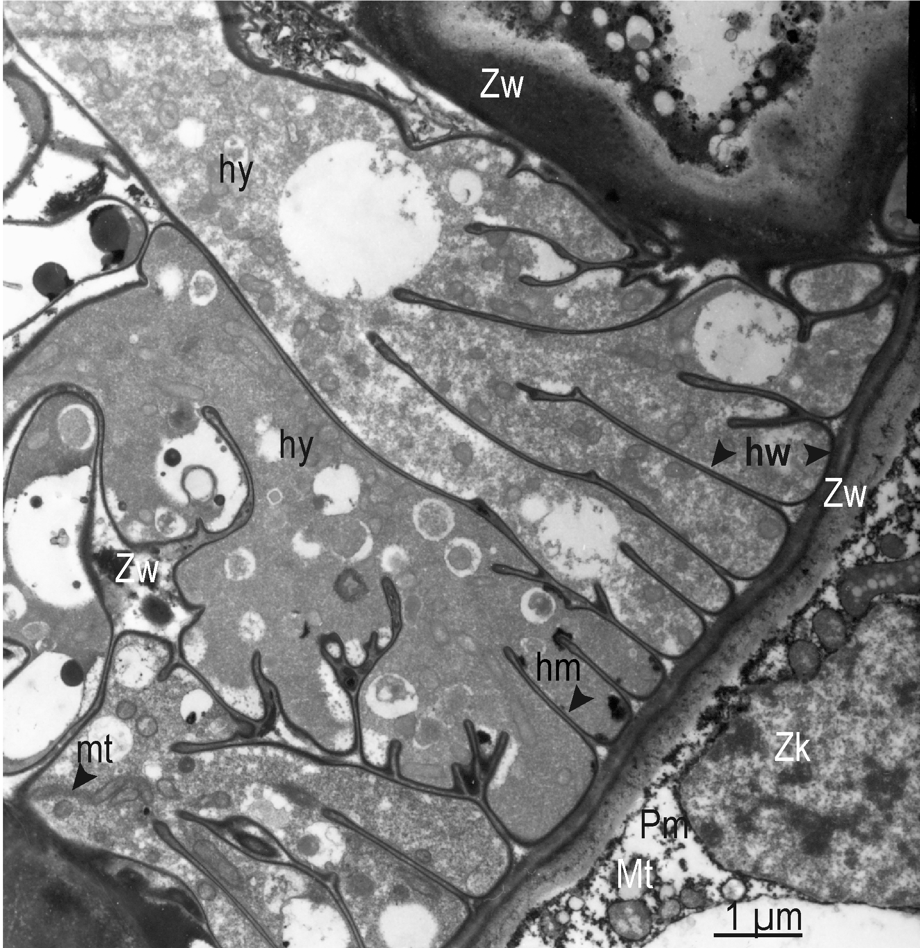 Transmissionseletronenmikrokopische Aufnahmen von intrazellulären Hyphen zwischen Rindenzellen im Hartig Netz einer MontropoïdeEktomykorrhiza. Legende : Cy Cytosol ; Va Vakuole ; Pm Plasmamembran ; Ma Interfaziale Matrix ; hy hyphe ; hm Hyphenmembran ; Zk zellkern